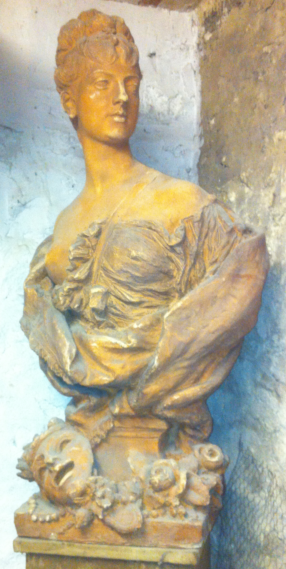 Buste de l'actrice Marie Magnier (1848-1913). Sculpté par Prosper d'Epinay en 1873. Hauteur 102cm. Collection privée.